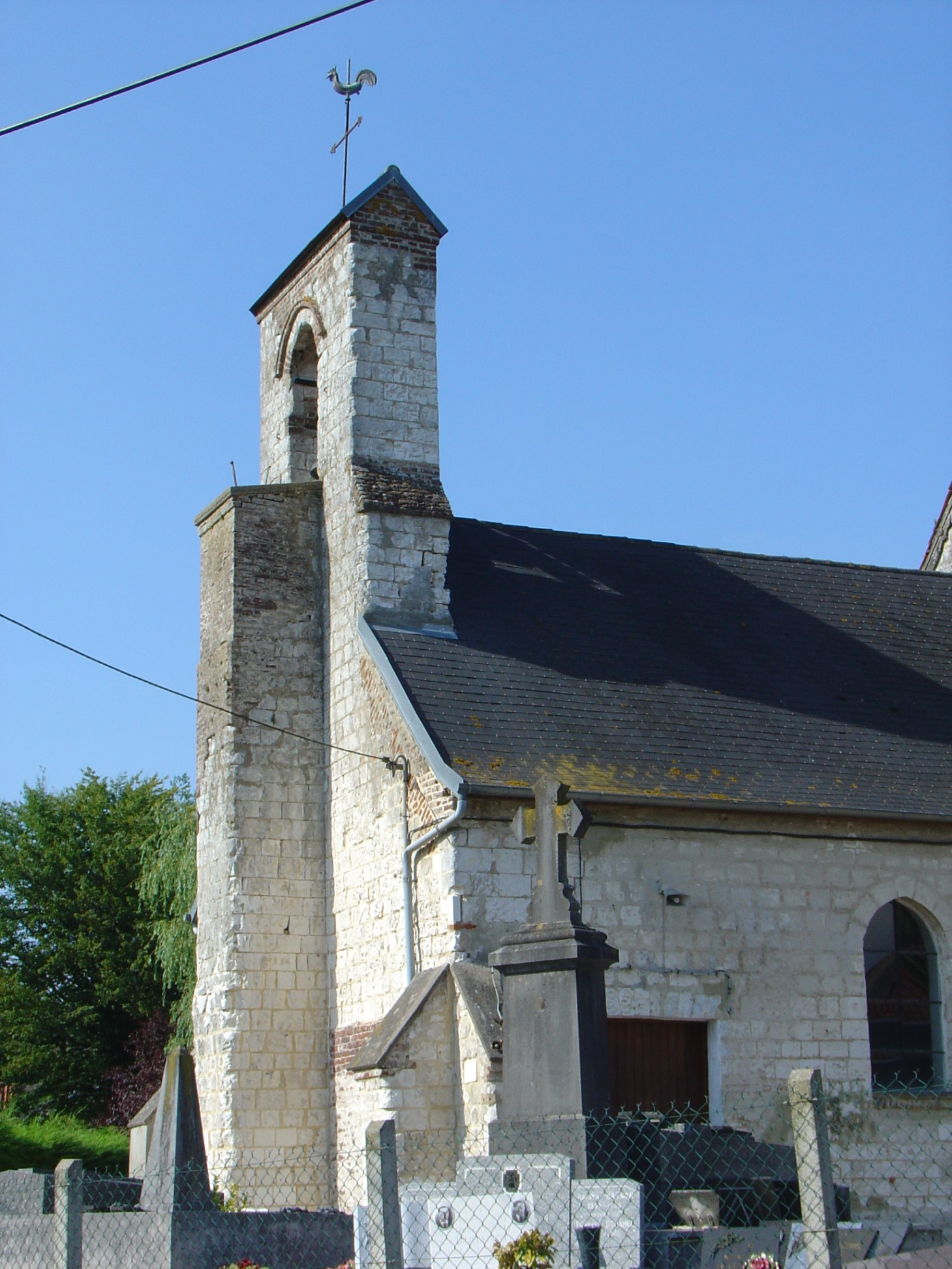 Église d'Offin